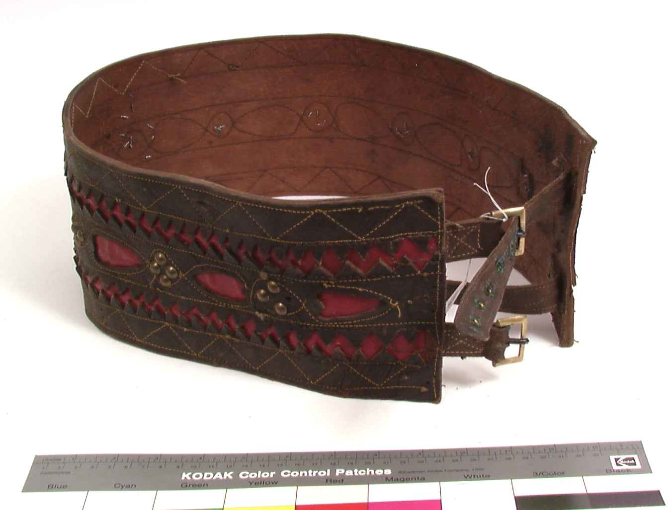 Samisk belte innkjøpt til Universitetets Etnografiske museum i juli 1891 under en reise som museets bestyrer Yngvar Nielsen gjorde i Troms, fra samer fra Jukkasjärvi som hadde sitt sommeropphold i Skoelvdalen i Bardu.